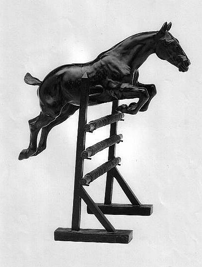 Jument Idylle sculptée par Gaston d'Illiers